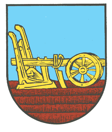 Wappen von Einöllen Shows heavy iron plow.